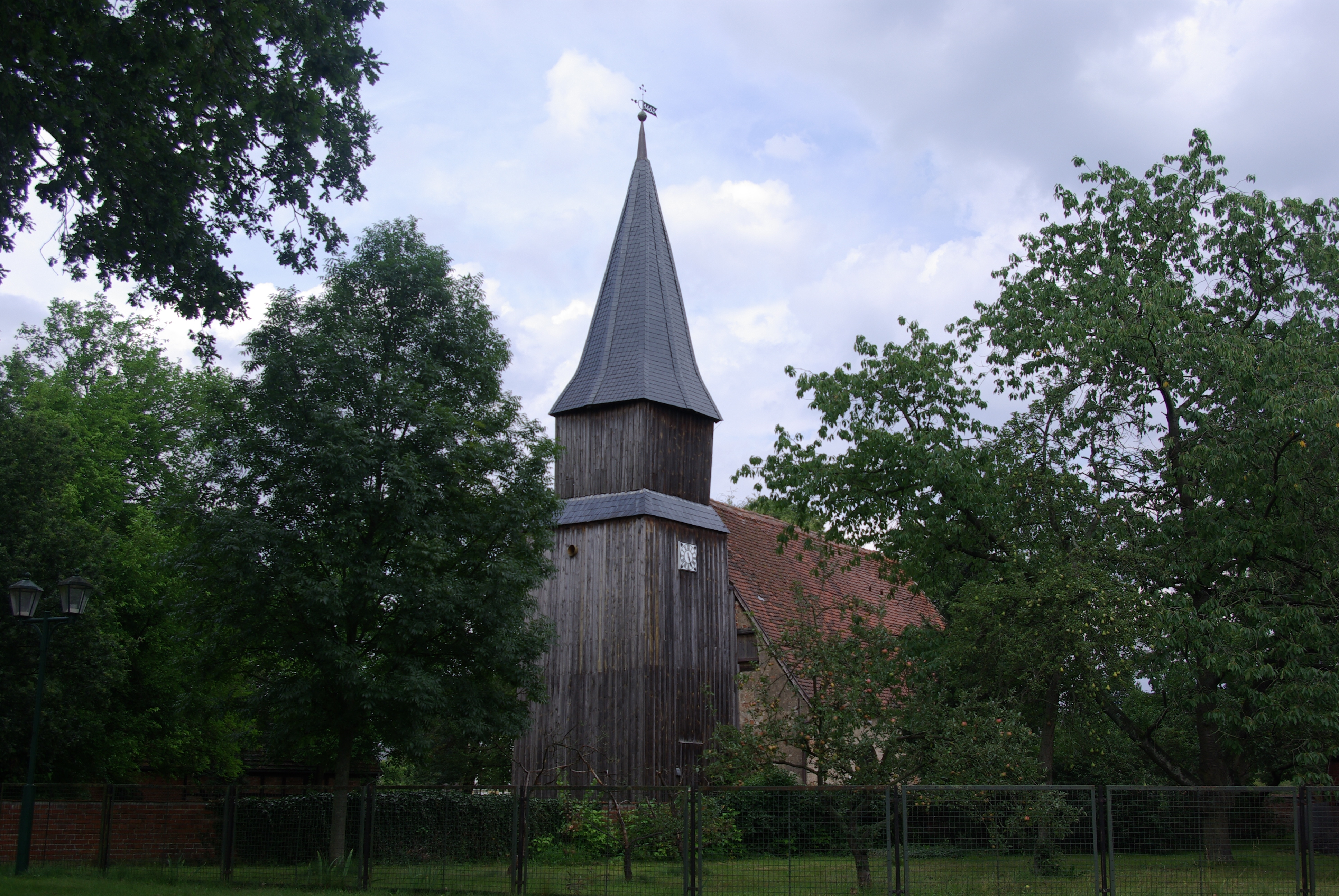 Lanz in Brandenburg. Die Kirche steht unter Denkmalschutz.